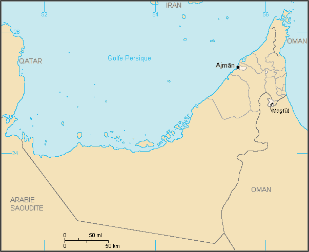 Description:Carte de l'émirat d'Ajman,Emirats arabes unis Auteur:Rémih